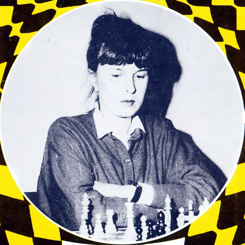 Czesława Pilarska (z domu Grochot, ur. 2 grudnia 1966) – polska szachistka i ekonomistka.